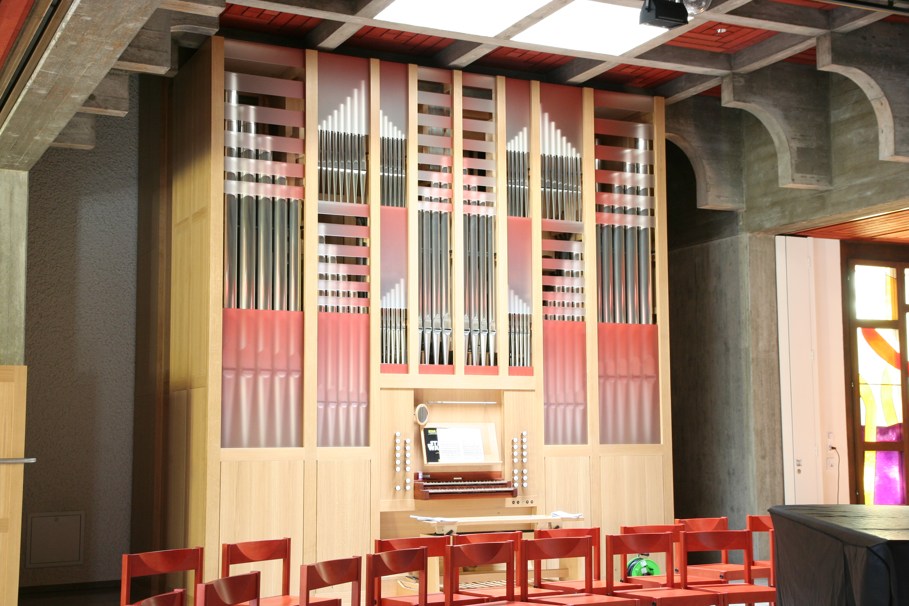 röm.-kath. Kirche St. Urban Winterthur-Seen